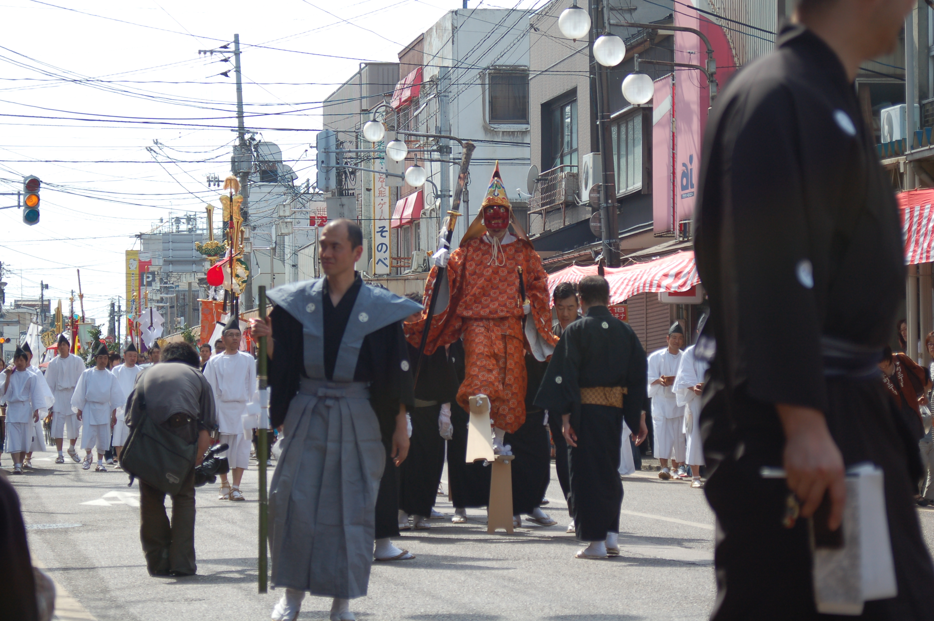 三条祭りの天狗様